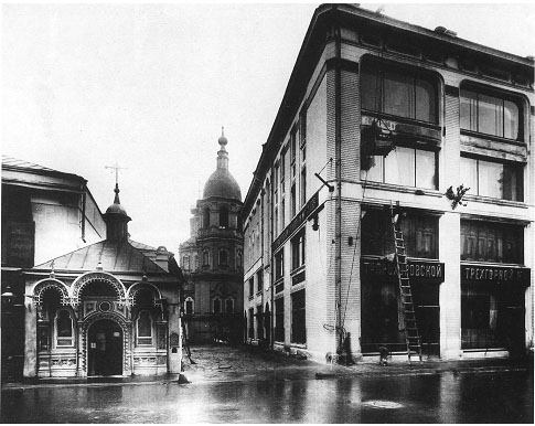 Афонская часовня Богоявленского монастыря на Никольской улице в Москве. Построена в 1883 году на деньги благотворителей собранные иеромонахом Арсением; снесена в 1929 году. Вдали видна колокольня Богоявленского монастыря.